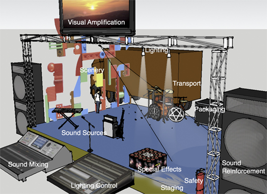 Prehľad pracovísk na Live eventoch